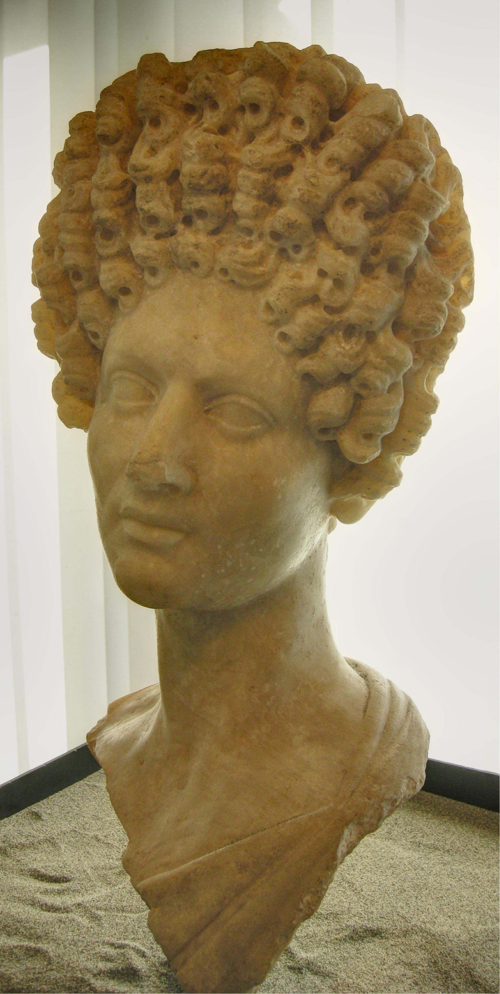 Ritratto muliebre